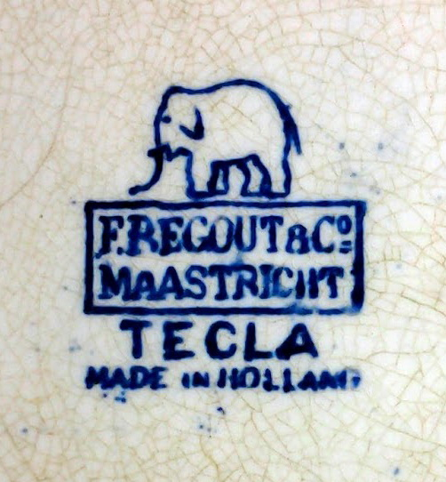 Beeldmerk met olifant van de aardewerkfabriek van Frederik Regout in Maastricht. De fabriek bestond slechts vijf jaar (1891-96). Aanvankelijk toonde het beeldmerk een liggende leeuw. die sterke gelijkenis vertoonde met de sphinx van de grote concurrent, De Sphinx, die het bedrijf in 1896 overnam.